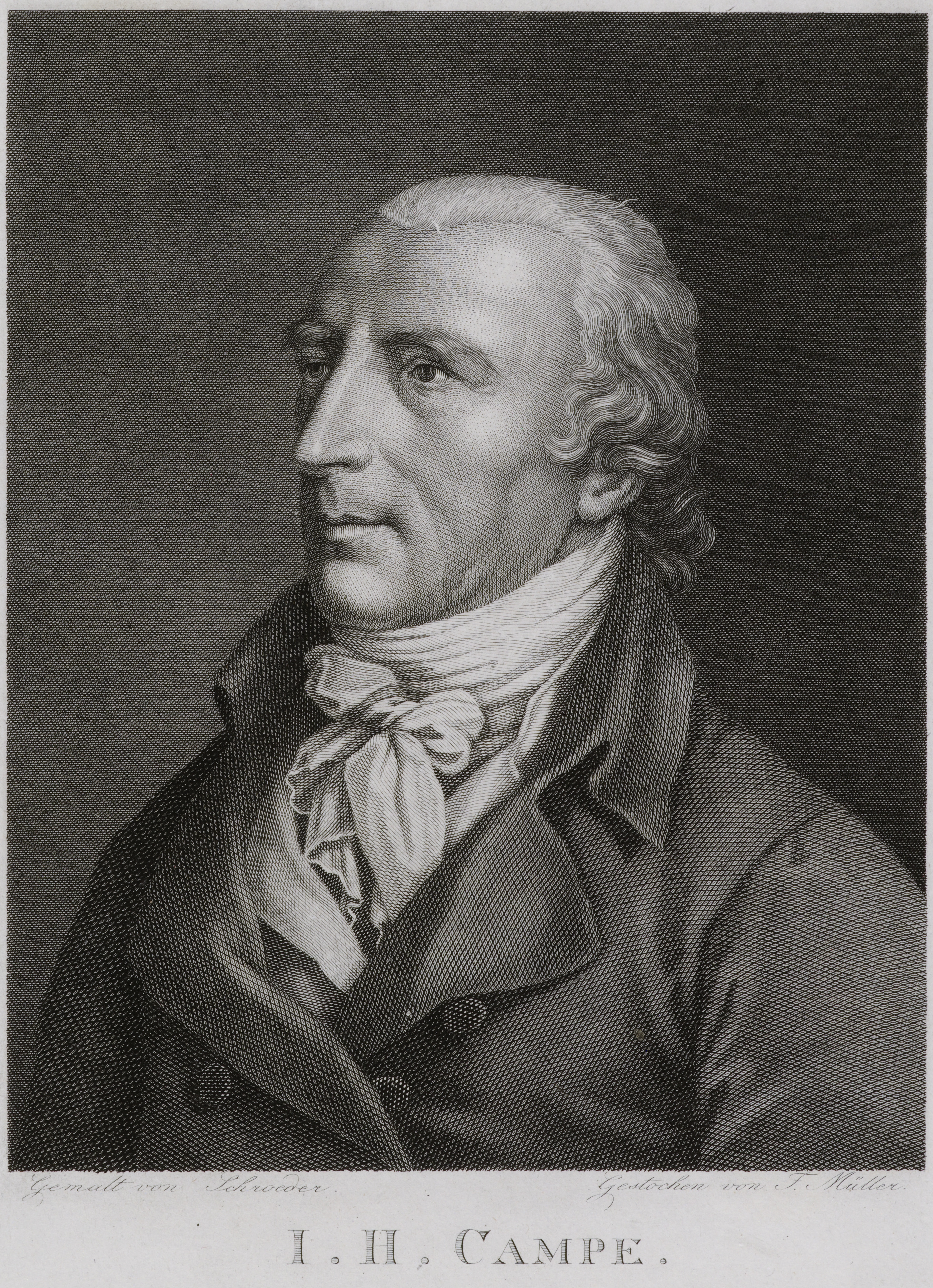 I. H. Campe